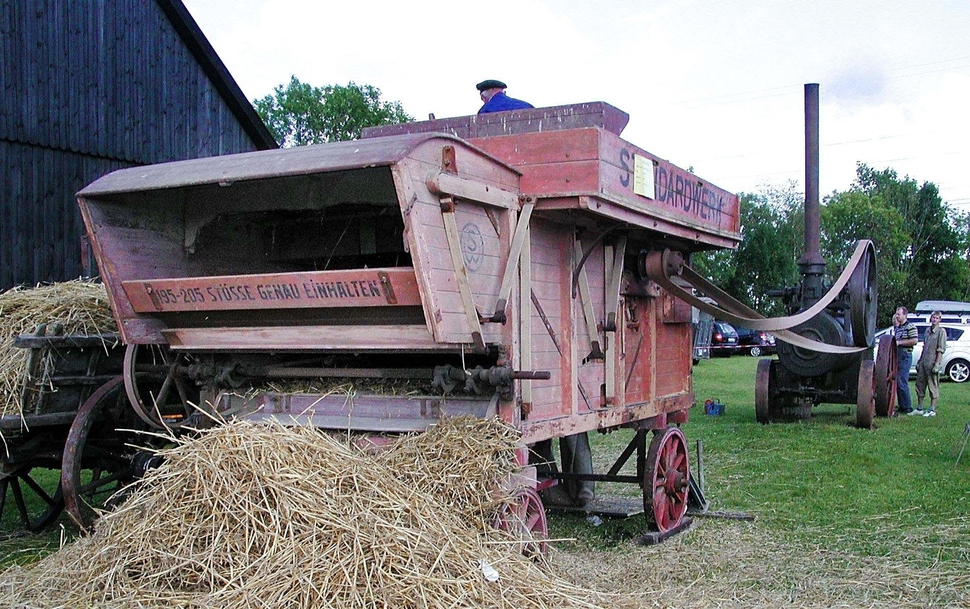 Dreschmaschine der Standardwerk Wilhelm Schulze KG, angetrieben von einer Lanz-Lokomobile aus dem Jahr 1911 bei der Moorseer-Mühle, Nordenham